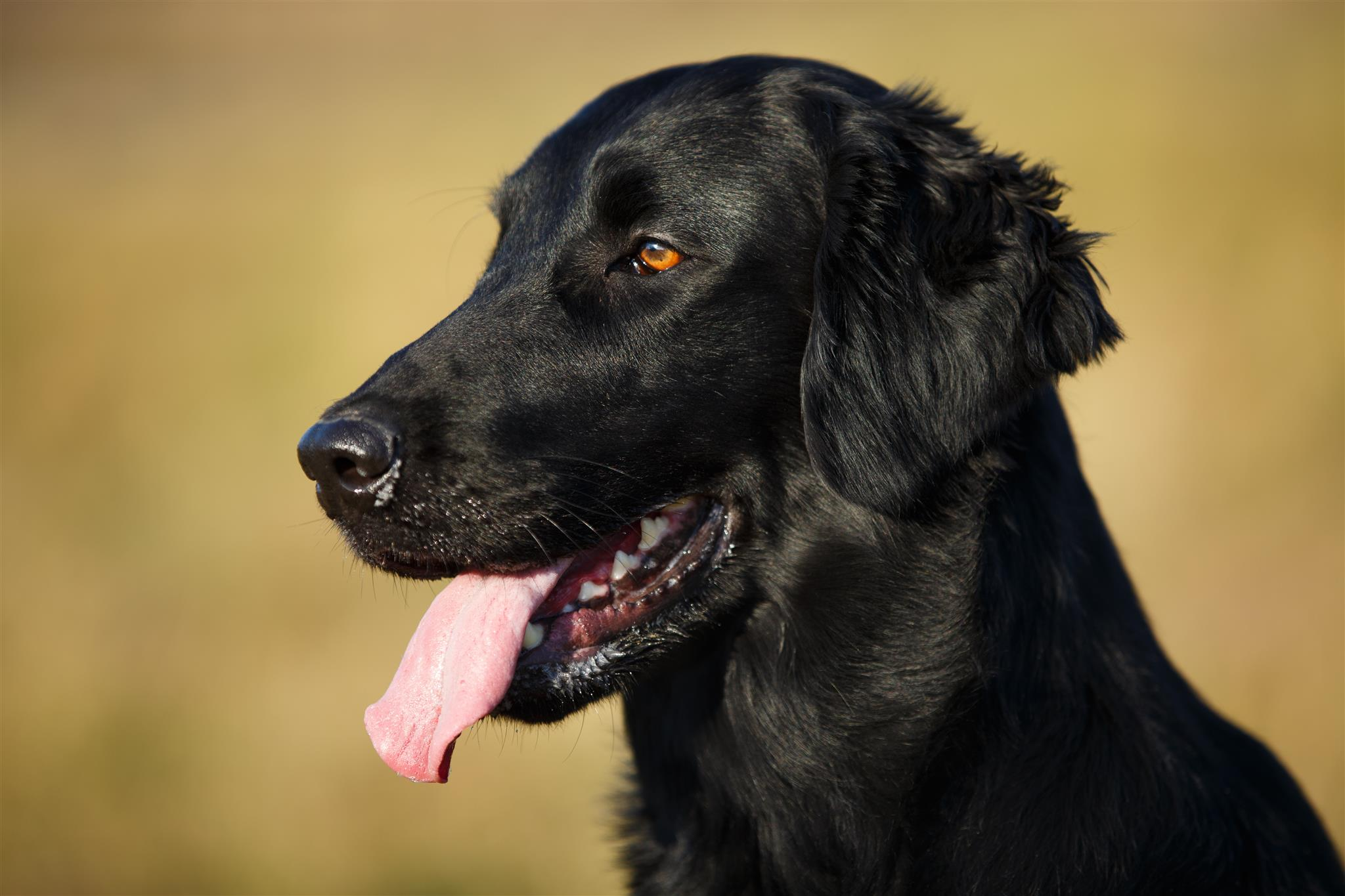 Flat Coated Retriever - hlava